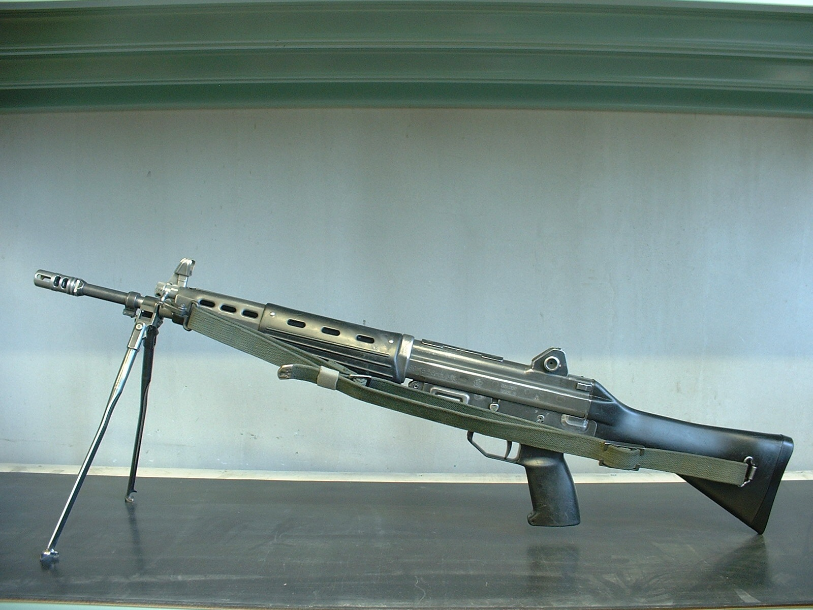 26普通科連隊第2中隊武器庫にて、89式小銃を撮影しております。 初期タイプですので、現在とは切替軸と負い紐及び刻印に違いがあります。